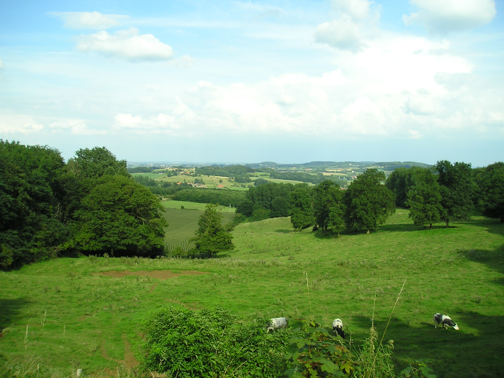 Mont des Cats